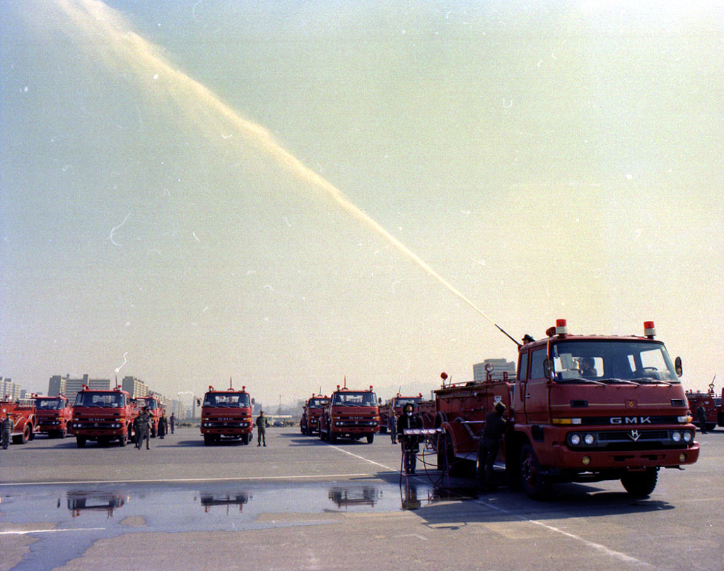 최초 국산소방차 인수식(The First Domestic-made Fire Trucks Ceremony)이 1977년 3월 28일 여의도광장에서 거행되었다. 김치열 내무부 장관을 비롯한 관계자들이 참석한 자리에서 소방차 36대, 화학차 6대에대한 성능시험이 있었다. 내무부에서 소방차의 부족과 장비의 근대화를 달성하기 위하여 1976년 9월 우리나라 최초로 48대의 국산 소방차를 하동환 자동차 공업주식회사에 발주한 것이 결실을 맺은 것이다. 그때까지 각종 소방차량을 외국에만 의존해 오던 것을 국산화 소방차로 대체하게된 계기가 되었다.